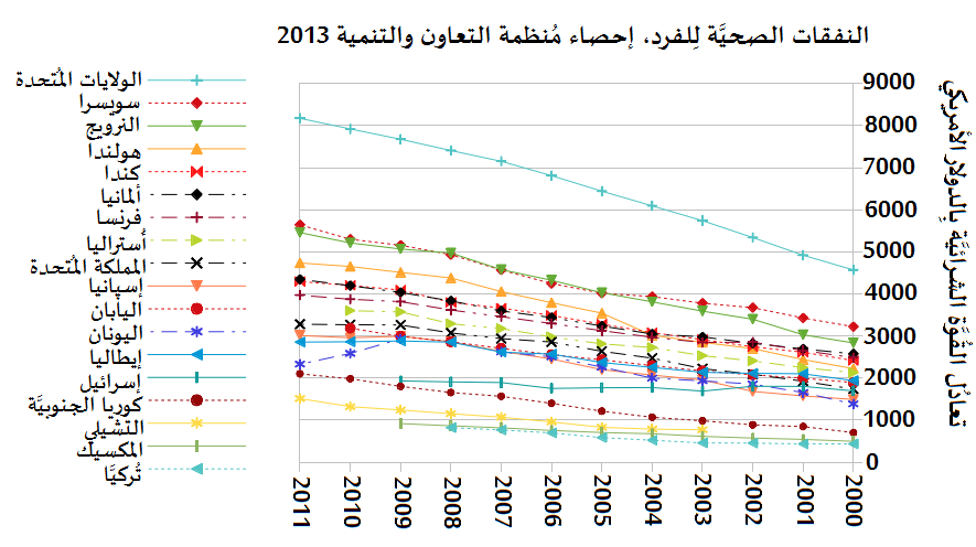 رسمٌ بيانيٌّ يتناول مُعدَّل الانفاق على الصحَّة لِلفرد بين عدَّة دُول أعضاء في مُنظمة التعاون والتنمية الاقتصاديَّة.